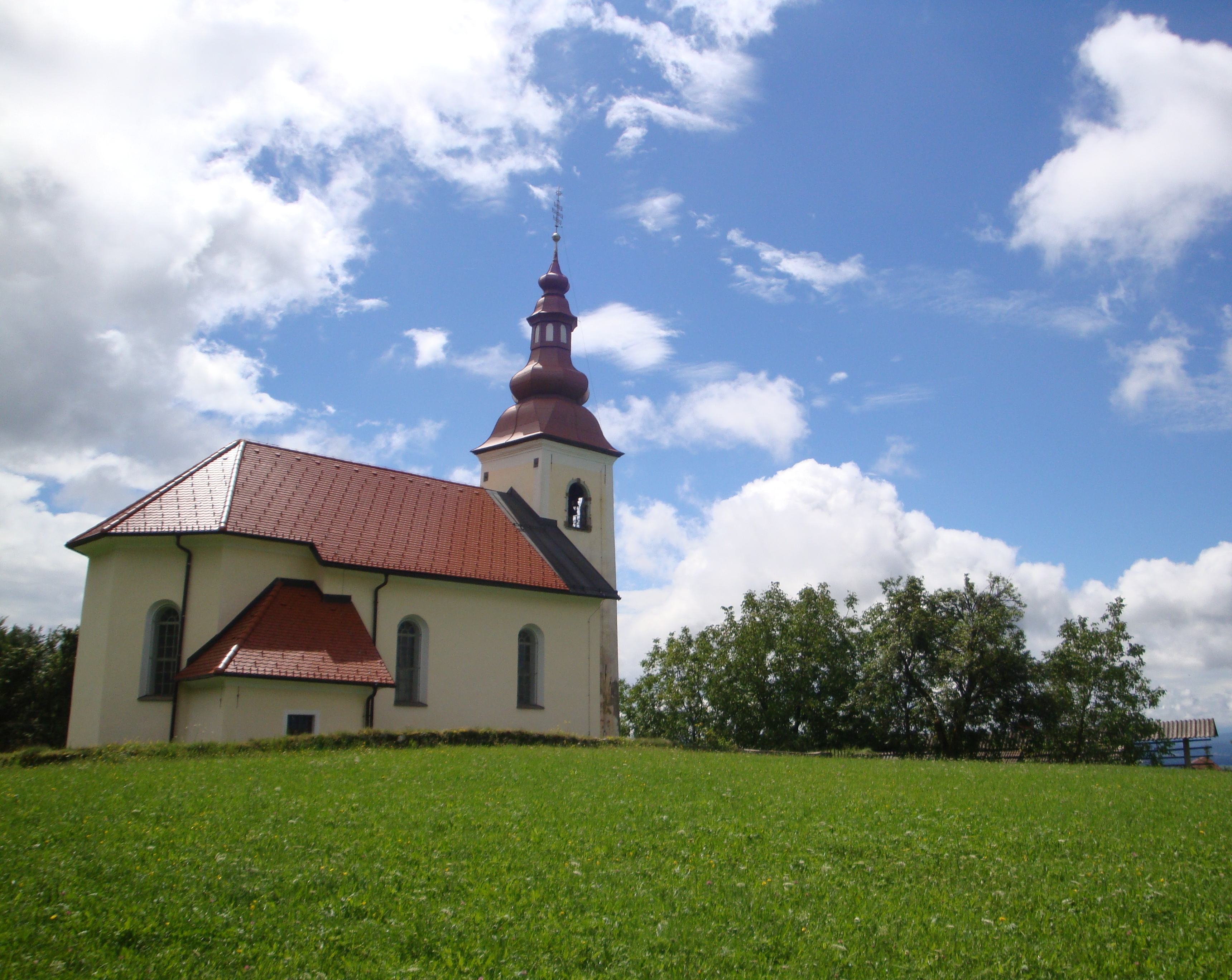 Cerkev sv. Miklavža na Možjanci, Slovenija.